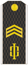 сержант РФ